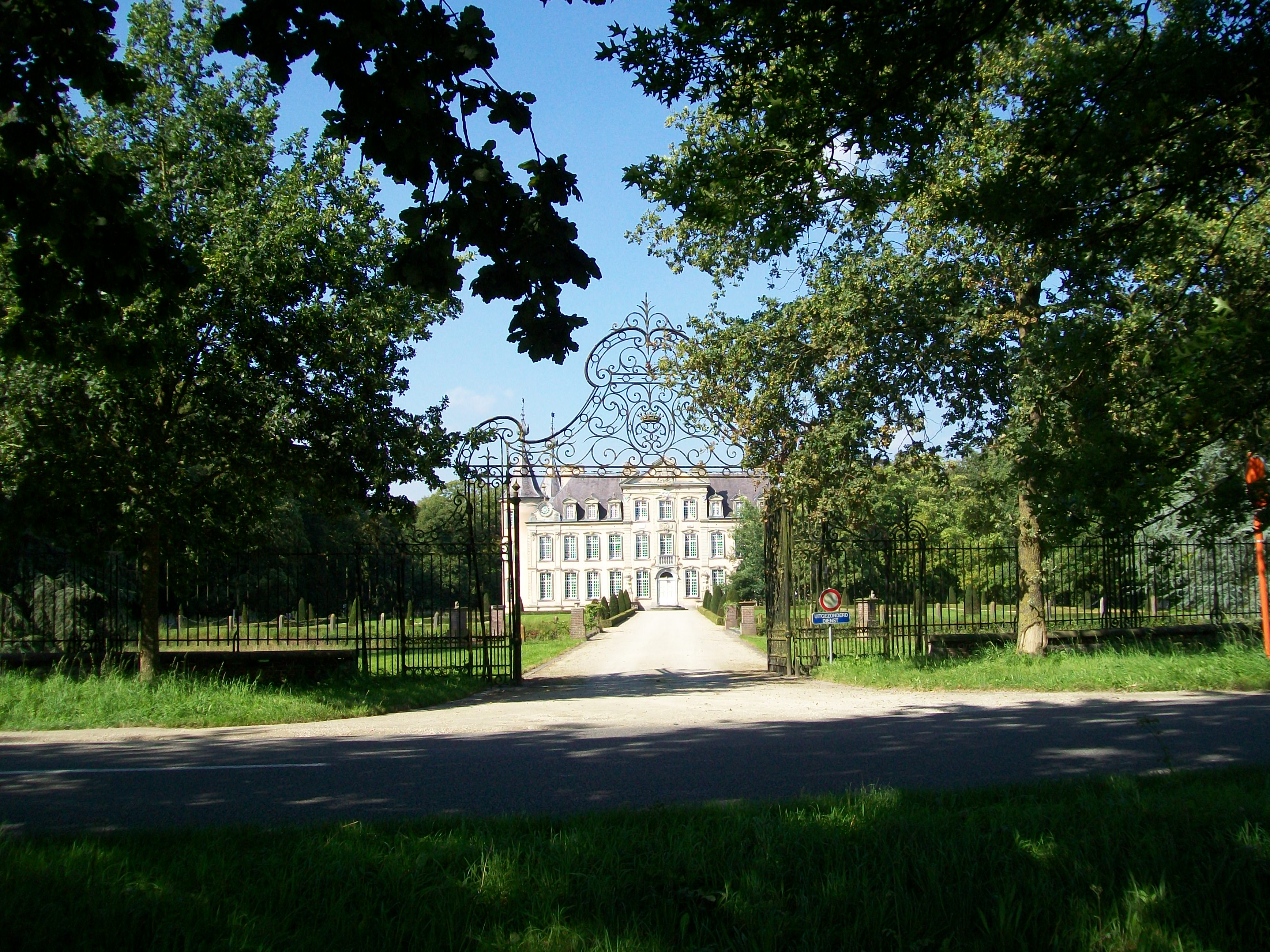 Onroerend erfgoed in Aalter: Kasteel van Poeke (waterkasteel met park) 34″ N, 3° 26′ 59.89″ E